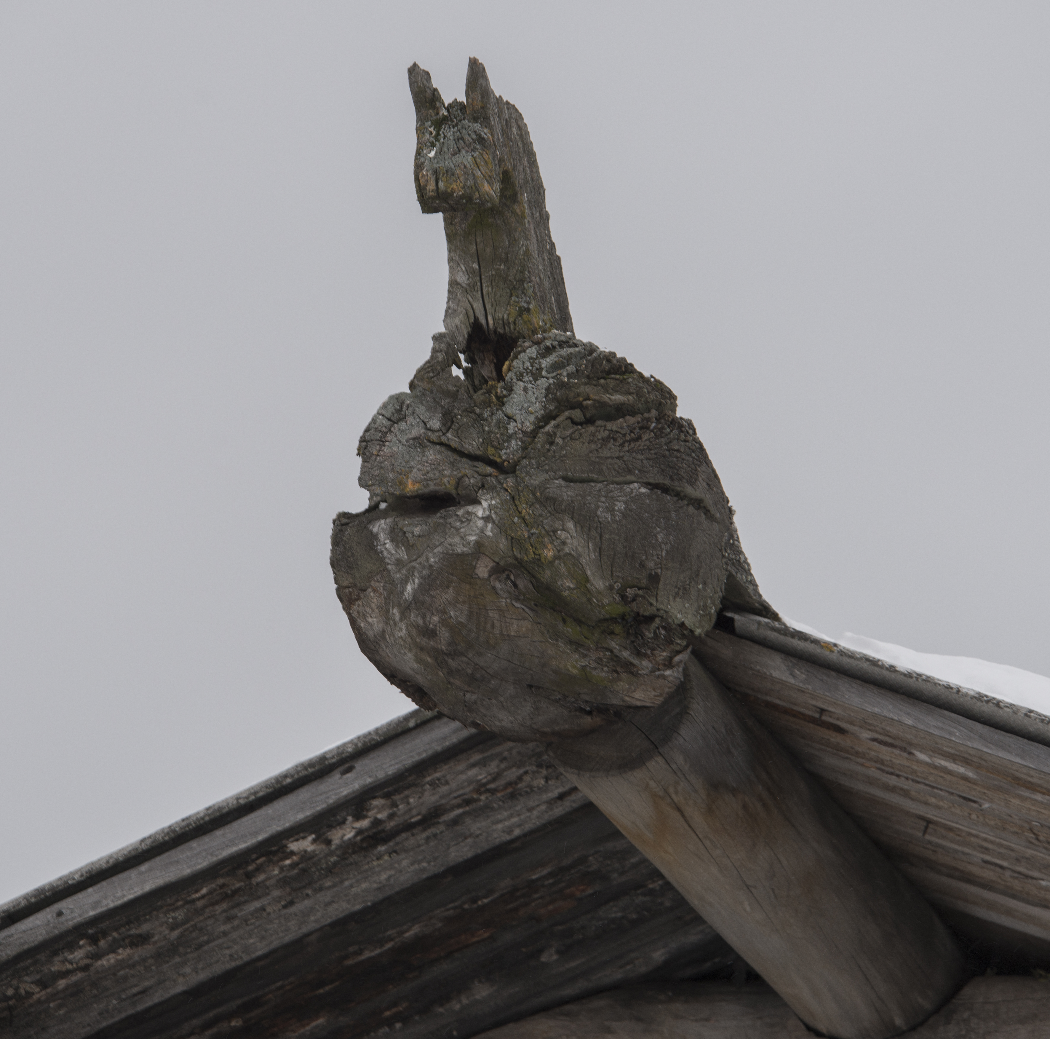 Дом А.М.Поршневой (фрагмент - охлупень): Явзора (Лавельская с/а), Пинежский район, Архангельская область